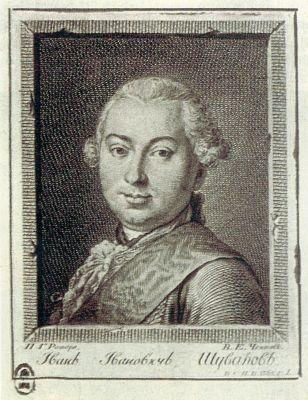 Ivan Ivanovich Shuvalov 1760 Гравюра резцом и сухой иглой